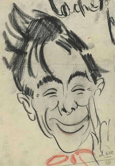 Dréan : caricature